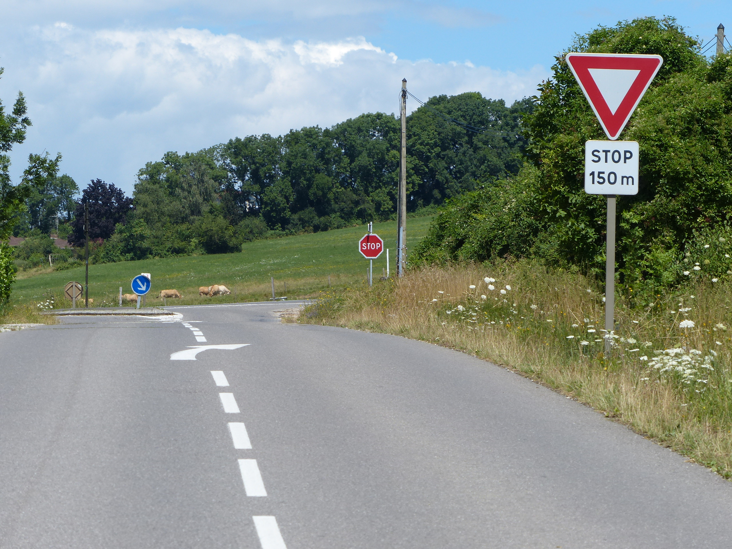 Panneau AB5, et AB4 et B21a1 en arrière-plan, à Cranves-Sales